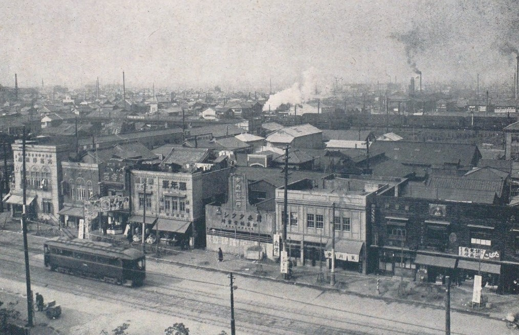 東京府立第三中学前。本所一帯、江東橋付近。右方向に錦糸町駅